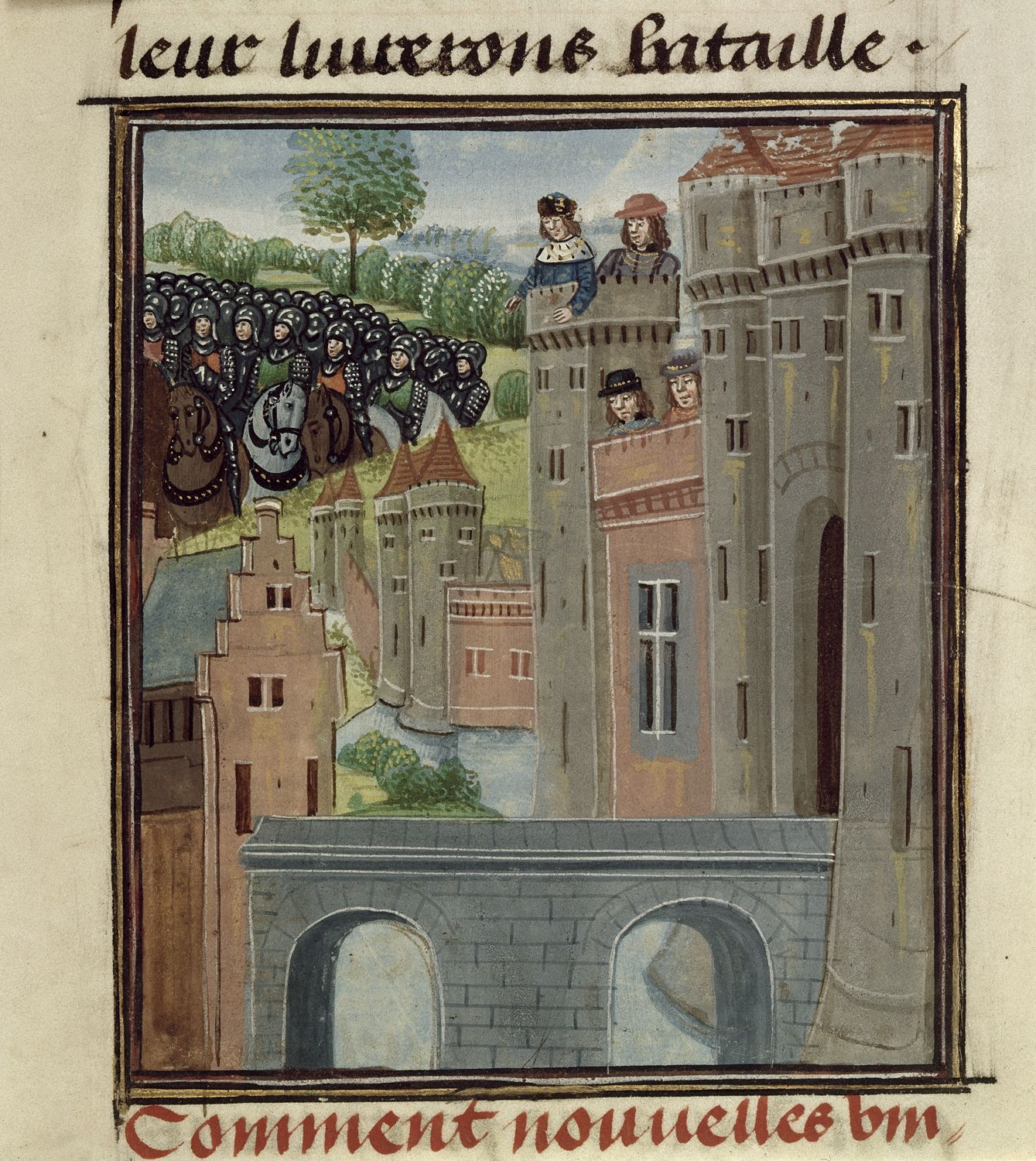 F393-Richard II au Château de Flint